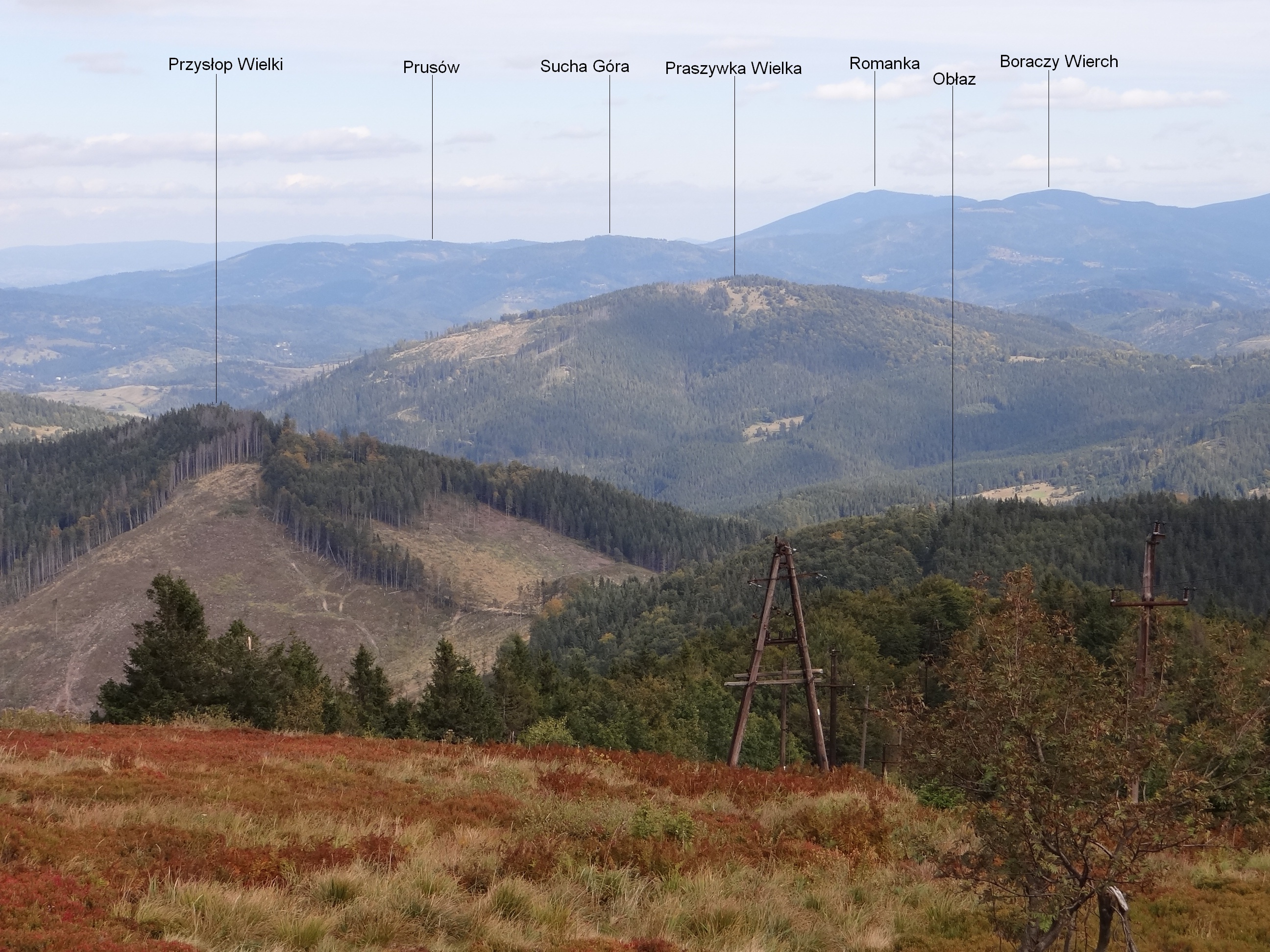 Widok z Wielkiej Raczy